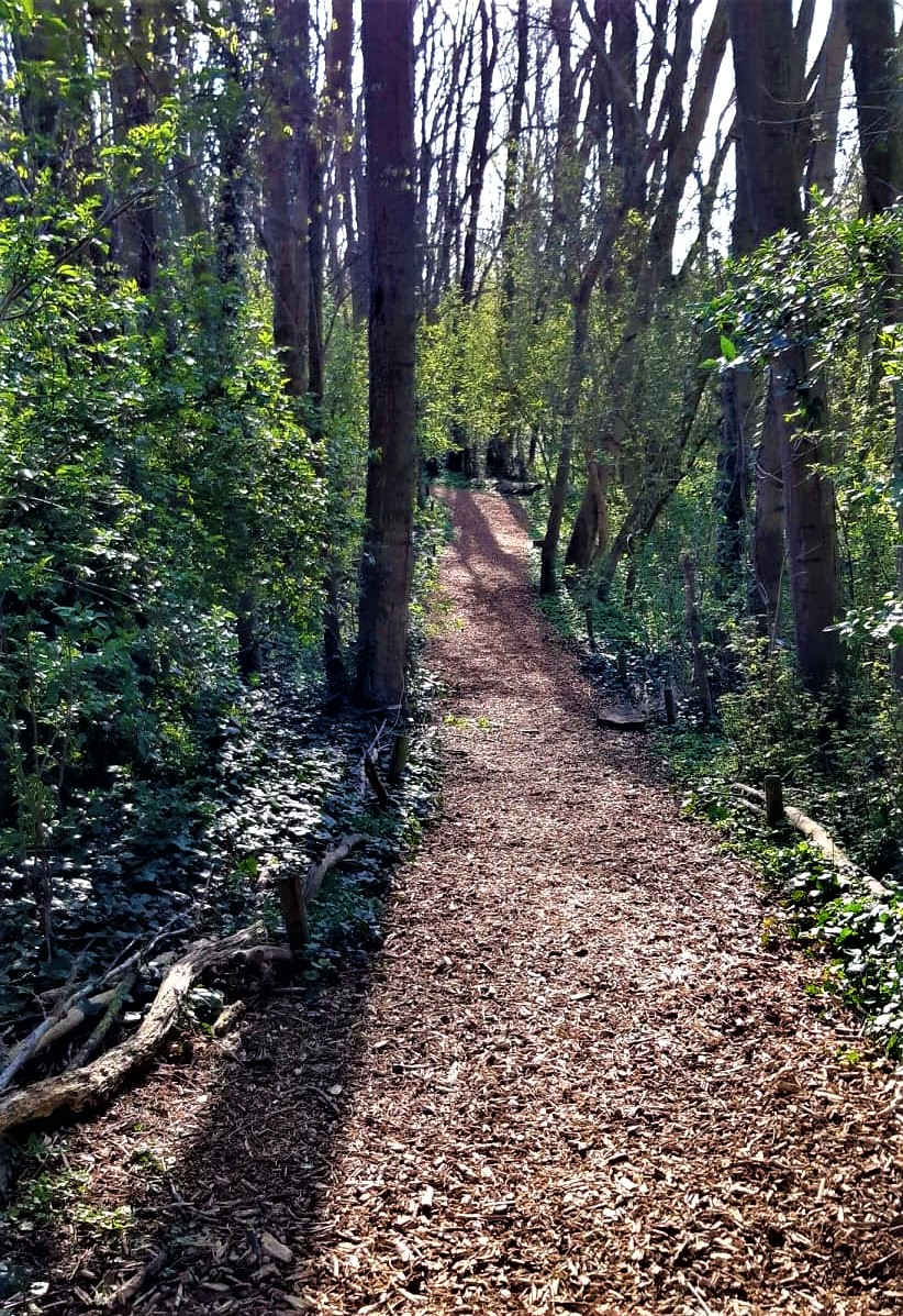 Heulebeekdomein (Kuurne) - wandelpad